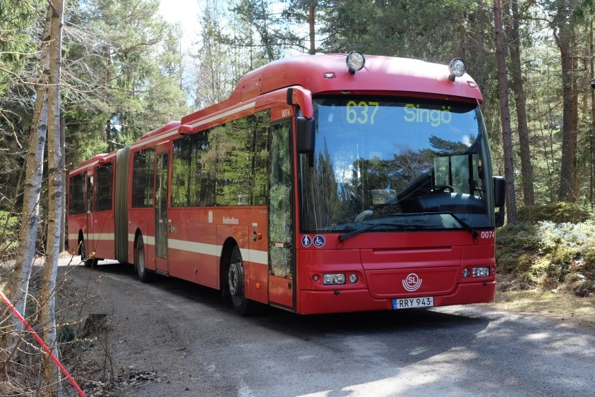 SL buss vid nordligaste SL-hållplatsen